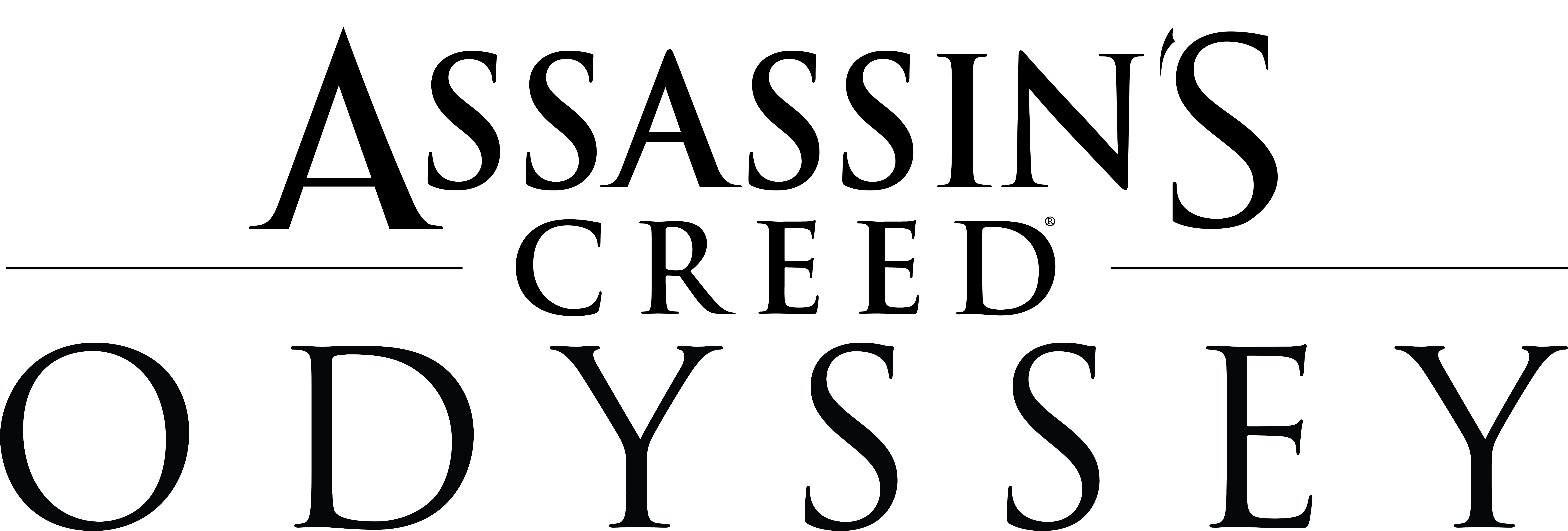 Logo di Assassin's Creed Odyssey